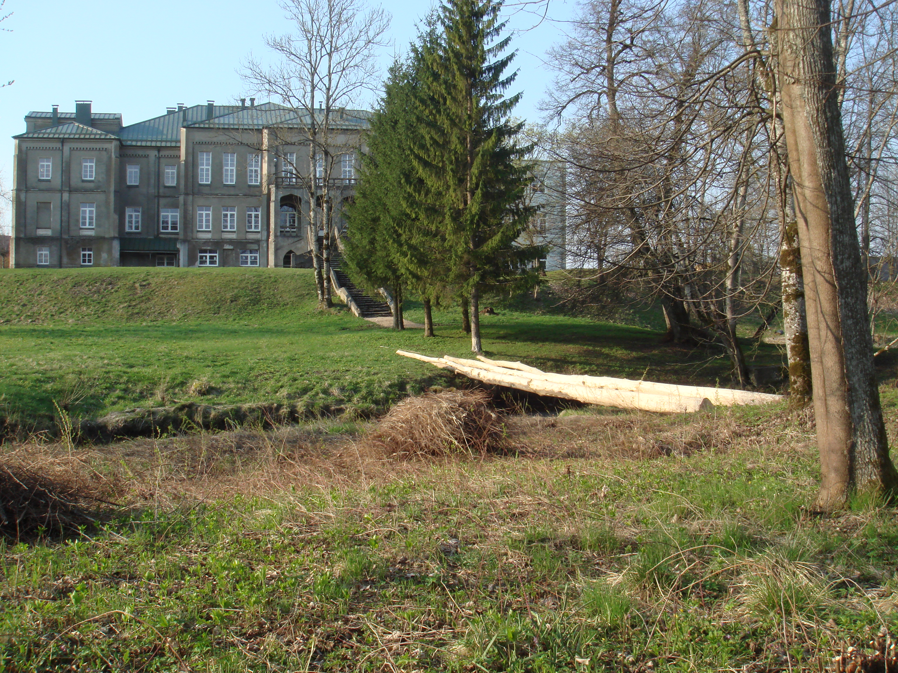 Bridge over river Virga